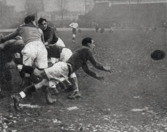 Lucien Serin, demi de mêlée international de l'AS bittéroise, ici en mai 1929 face à Narbonne pour une qualification en demi finale du championnat de France (perdue face à Lézignan).